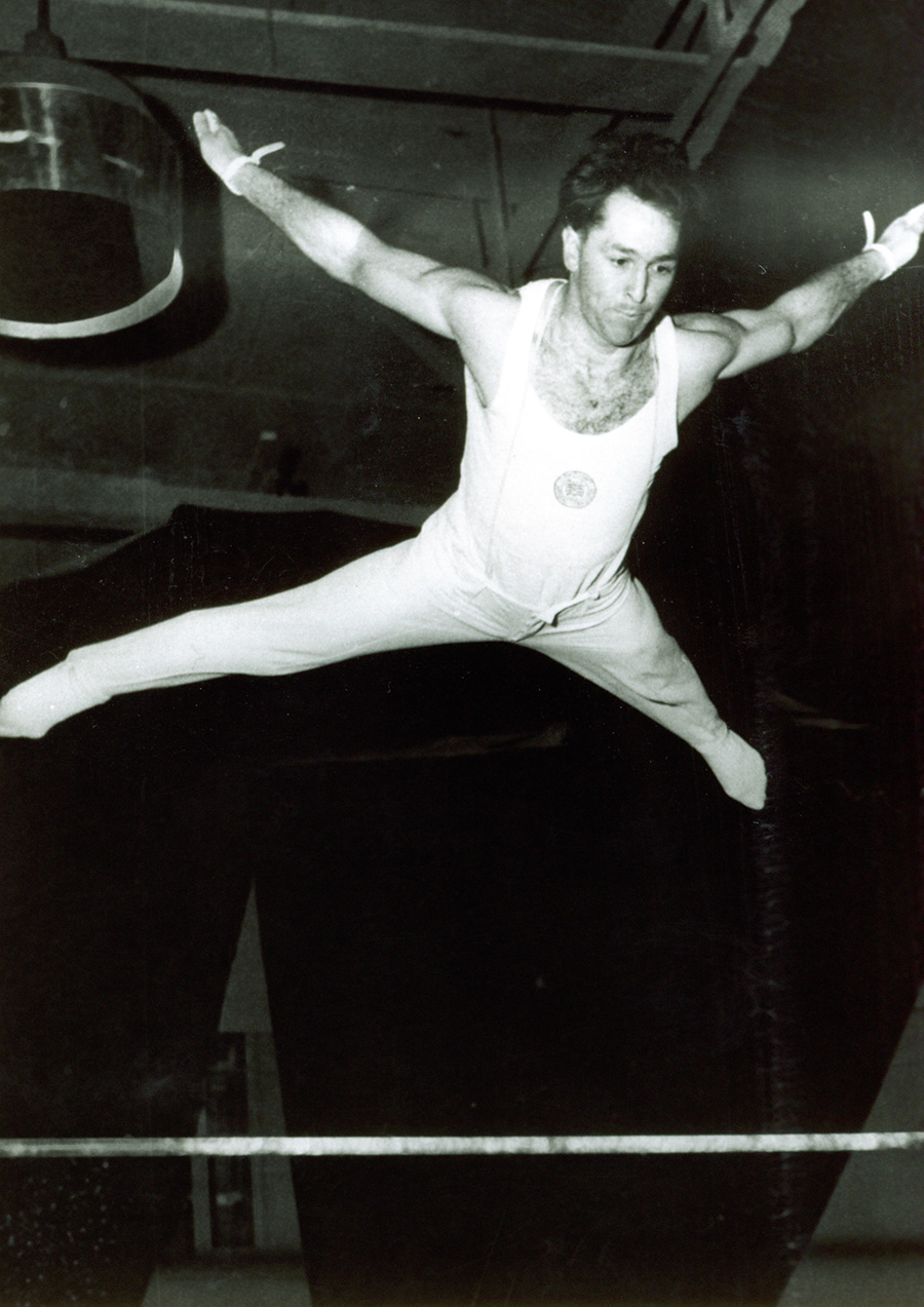 Der Vorarlberger Kunstturner Hans Sauter aus Bregenz nahm an vier Olympischen Spielen teil: 1948 in London, 1952 in Helsinki, 1956 in Melbourne und 1960 in Rom.